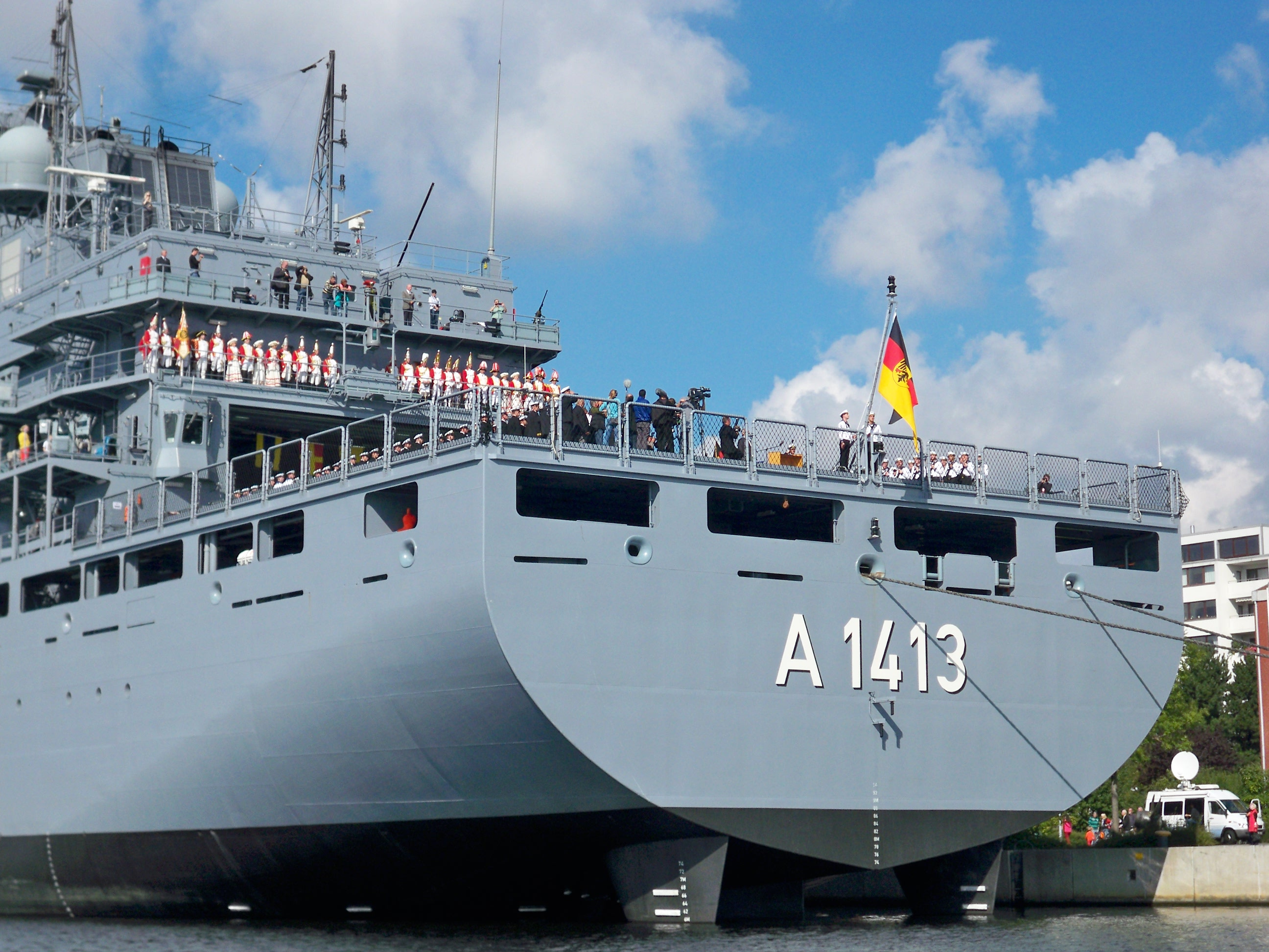 Durch Hissen der Flagge der Seestreitkräfte wird die Bonn in Dienst gestellt